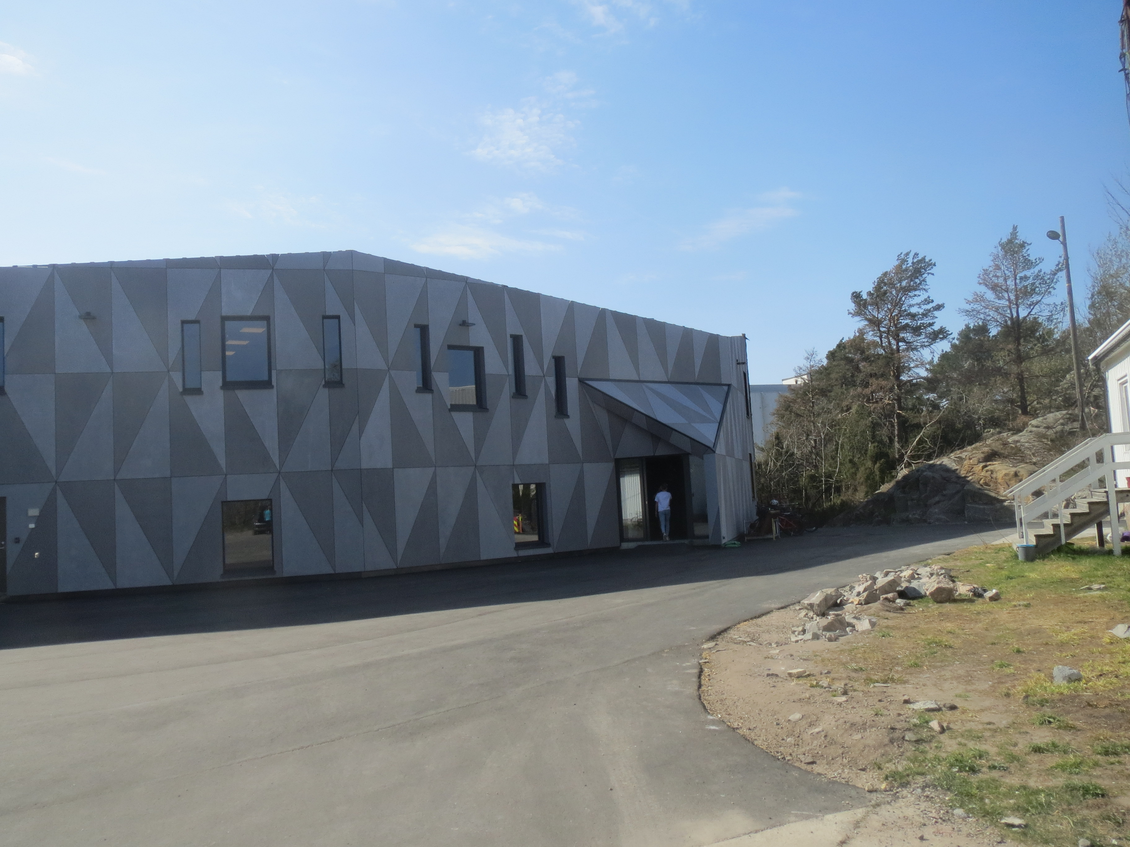 Innendørs aktivitetspark, sett fra hovedinngang